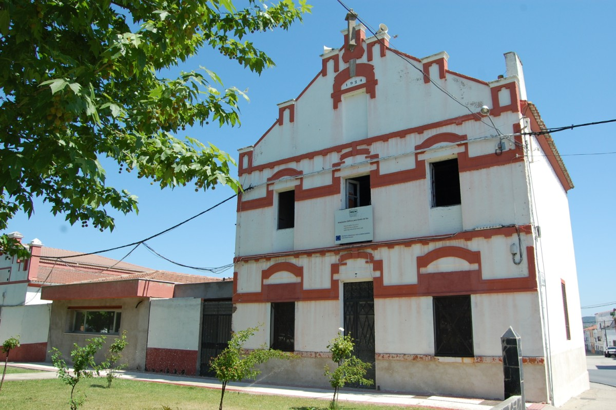 Edificio en Carcaboso, provincia de Cáceres, España.